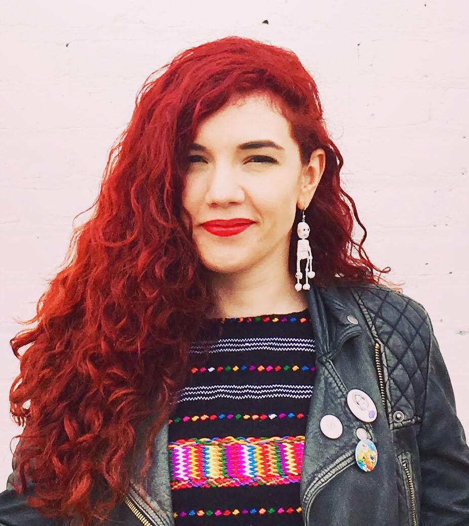 Tamara De Anda (Plaqueta)